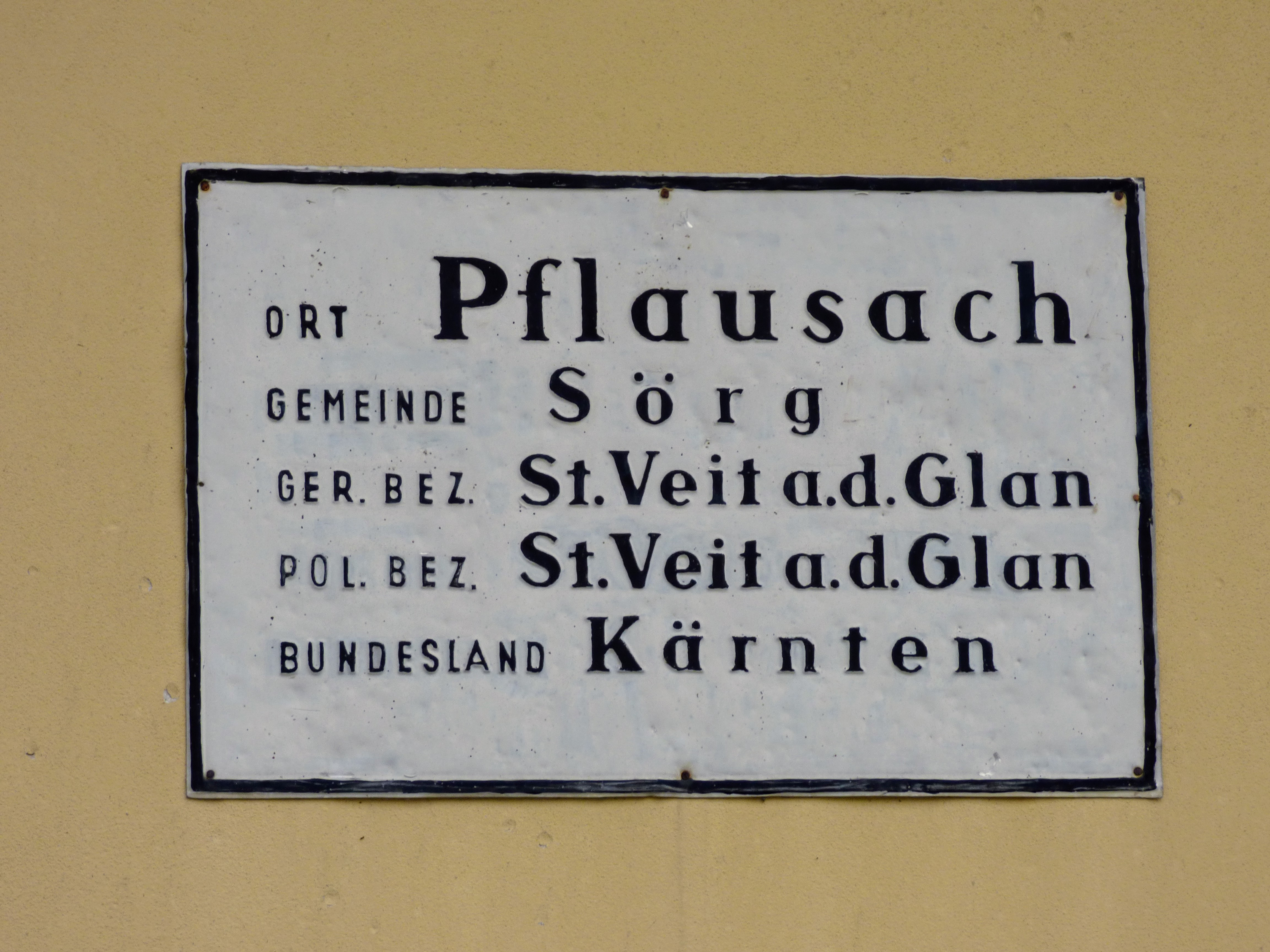 Ortschaftstafel Pflausach damals Gemeinde Sörg, heute Gemeinde Liebenfels